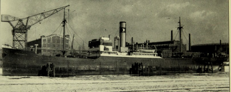 Frachtdampfer Olga Siemers